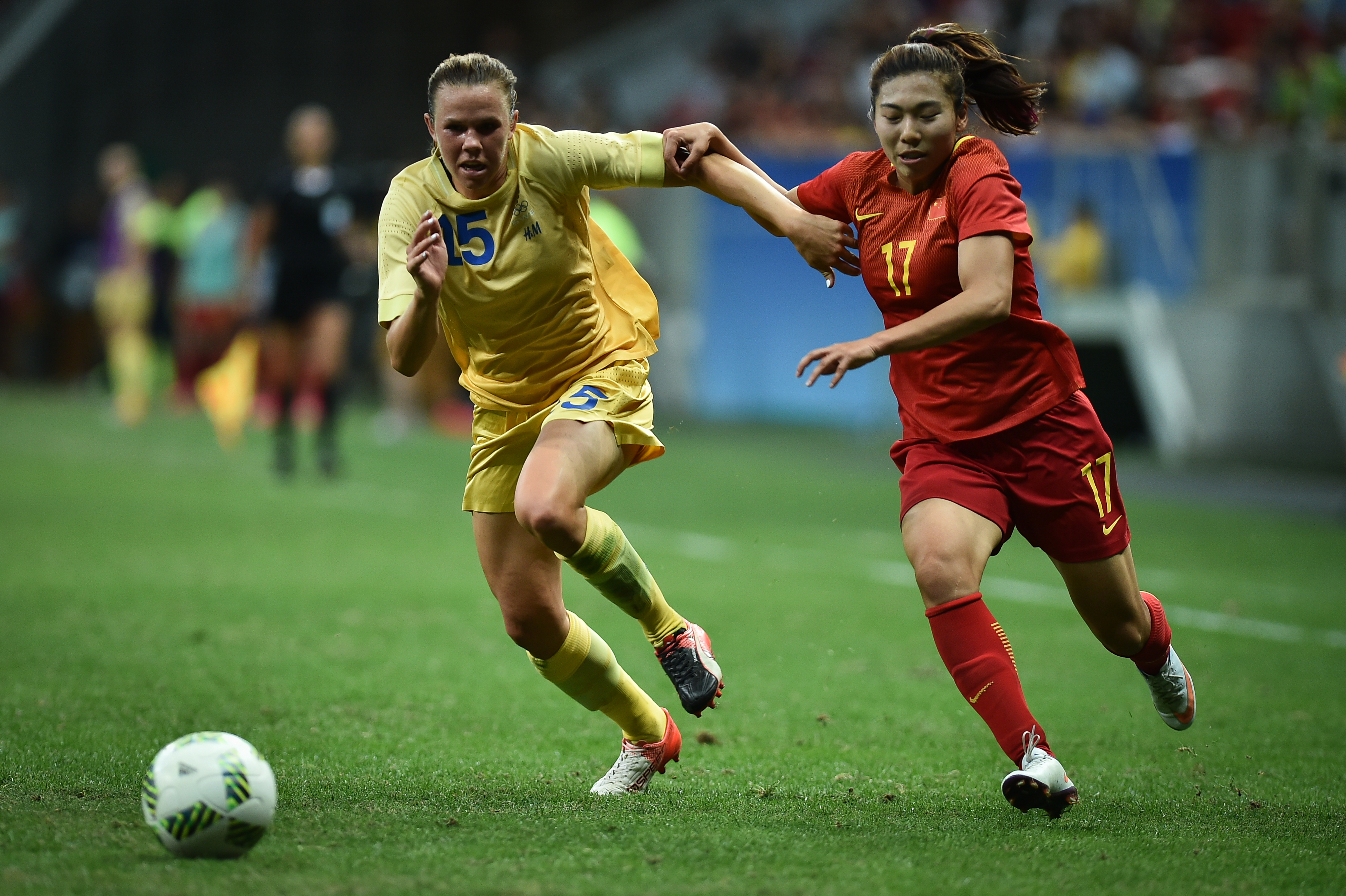 Estádio Nacional de Brasília Mané Garrincha, Brasília, DF, Brasil, 9/8/2016 Foto: Andre Borges/Agência Brasília China e Suécia jogam nesta terça-feira (9), no Estádio Mané Garrincha, pelo grupo E do futebol feminino na Olimpíada 2016.